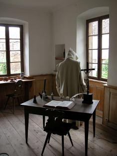 Reconstitution d'une cellule de la Chartreuse